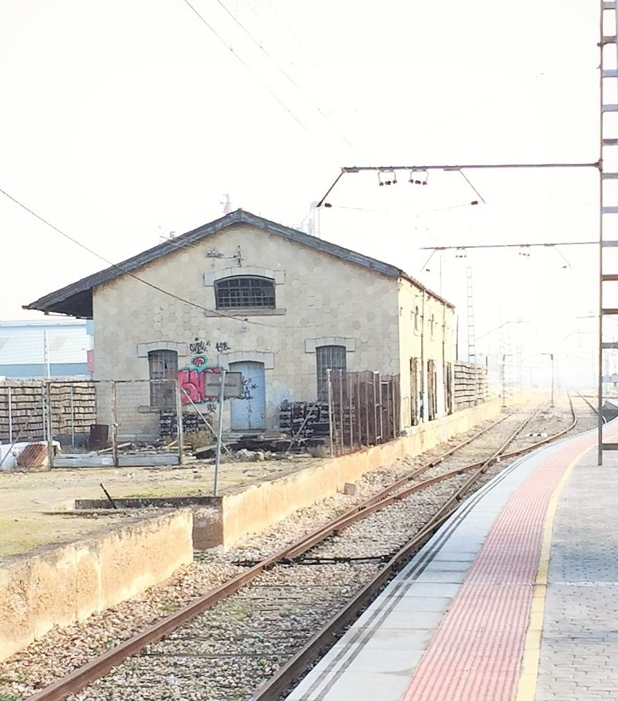 Antiguo muelle de carga de la estación de ferrocarril en Campo de Criptana